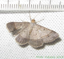 Chiasmia normata